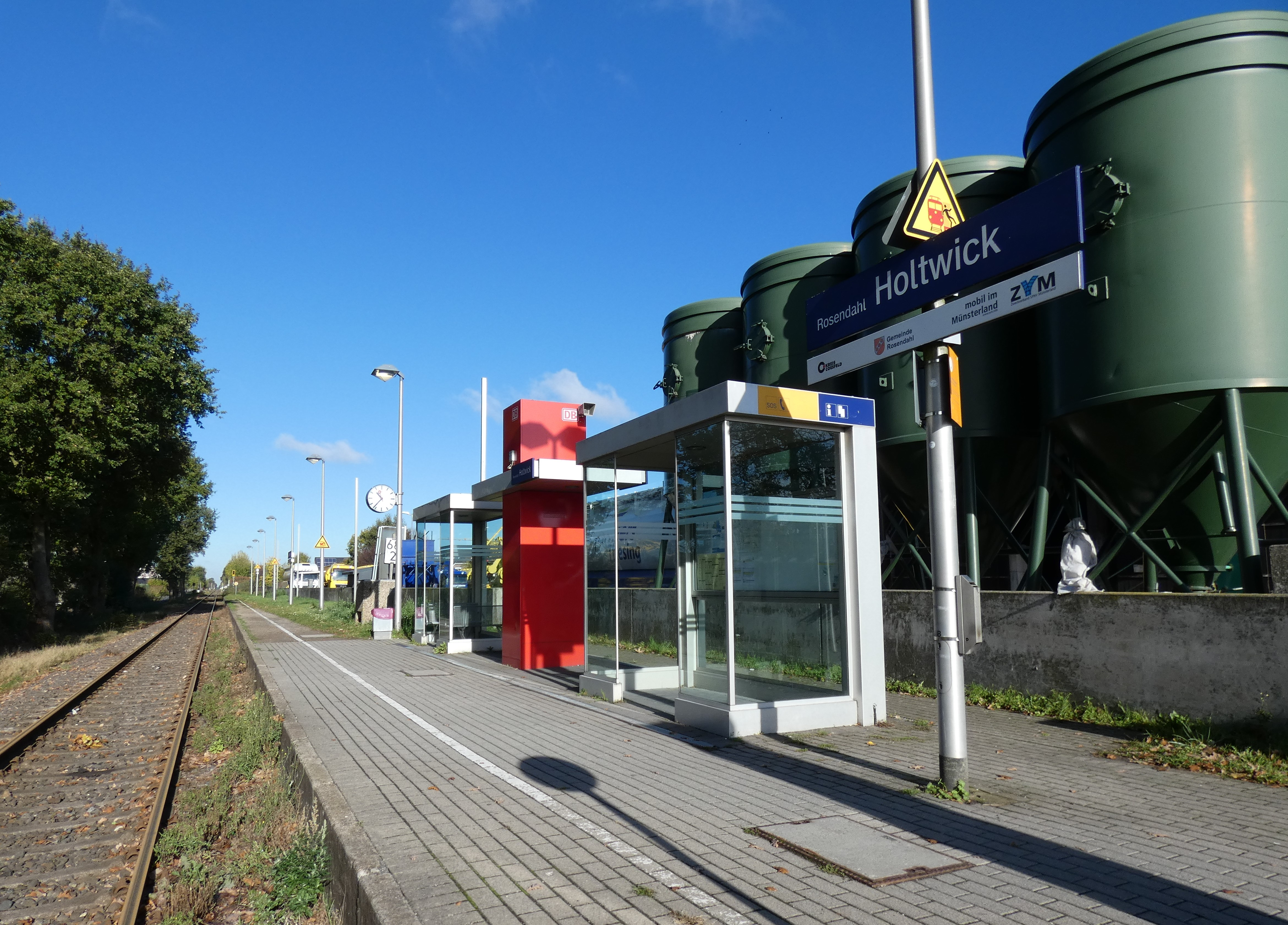 Bahnhof in Rosendahl-Holtwick, Kreis Coesfeld, NRW, Germany